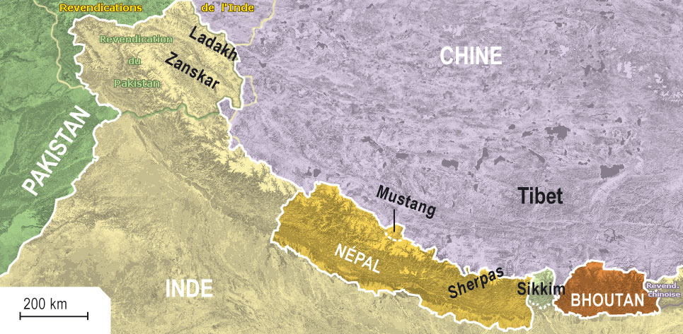 États et régions de l'Himalaya (parcourus par Michel Peissel)